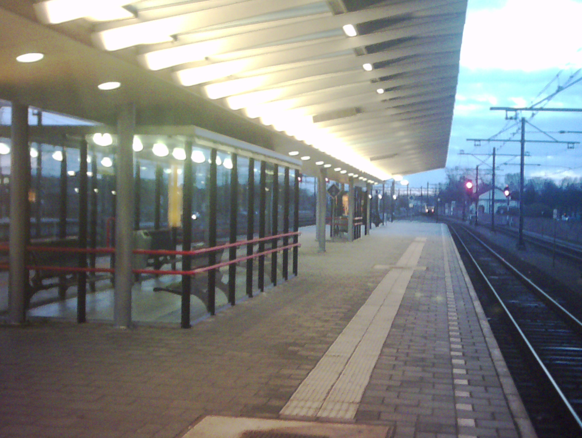 Perron Boxtel